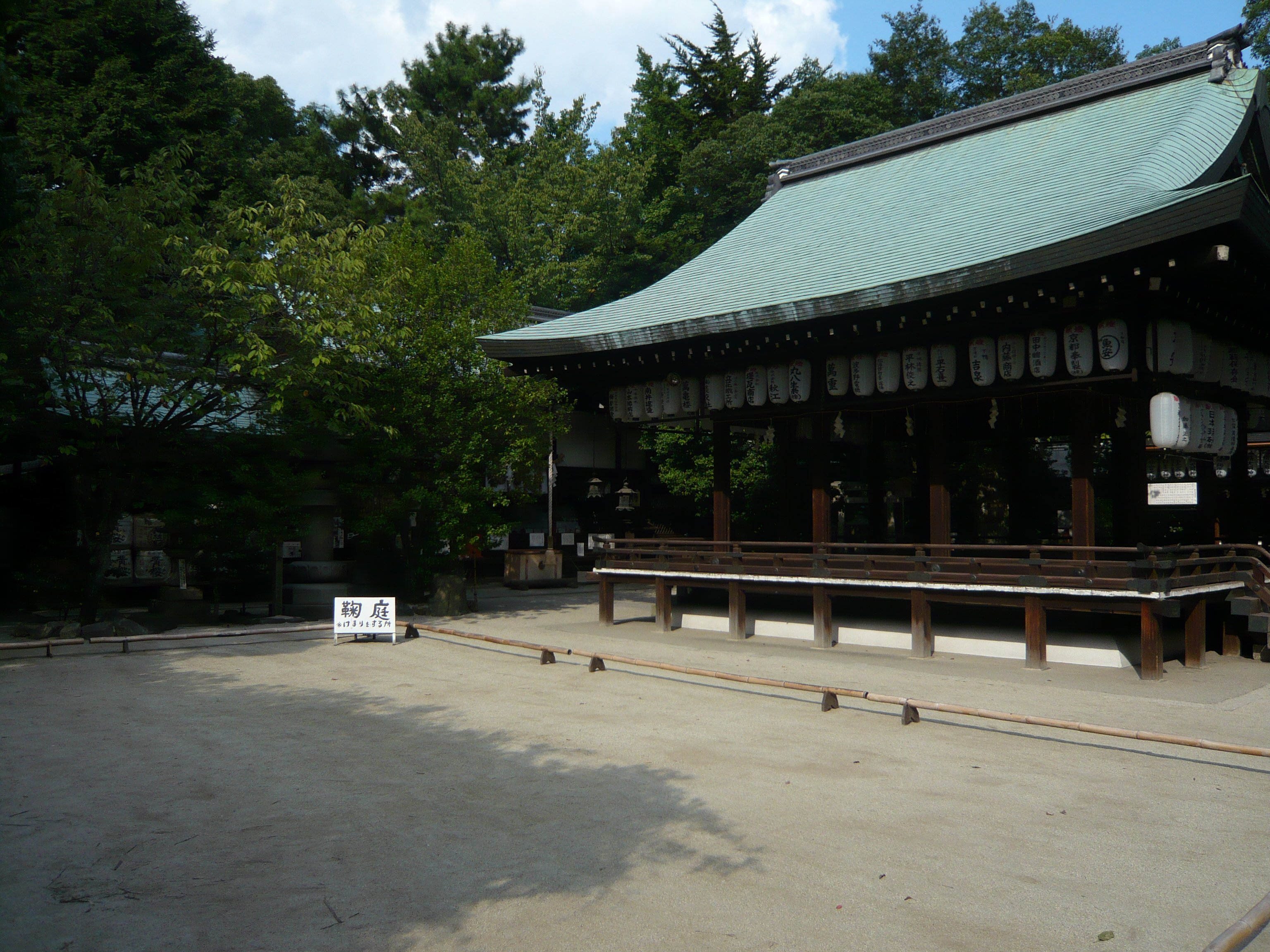 Shiramine-jingū, Kamigyō, Kyōto, Japan 白峯神宮境内（京都市上京区）